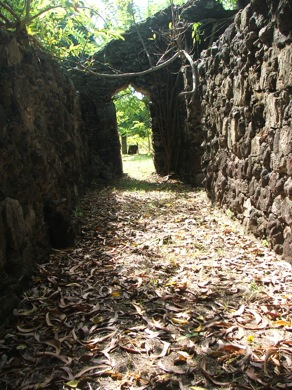 travail personnel